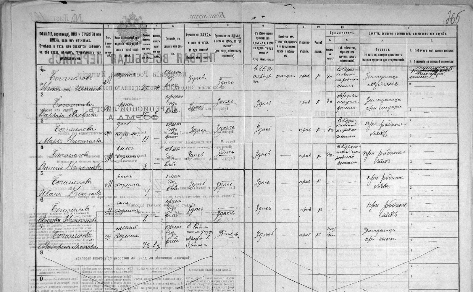 Перепись 1897, Ярославская губерния, дер. Курякино (ныне Тутаевский район почтовое отделение Першино), семья Богомоловых. Читается текст на обратной стороне листа